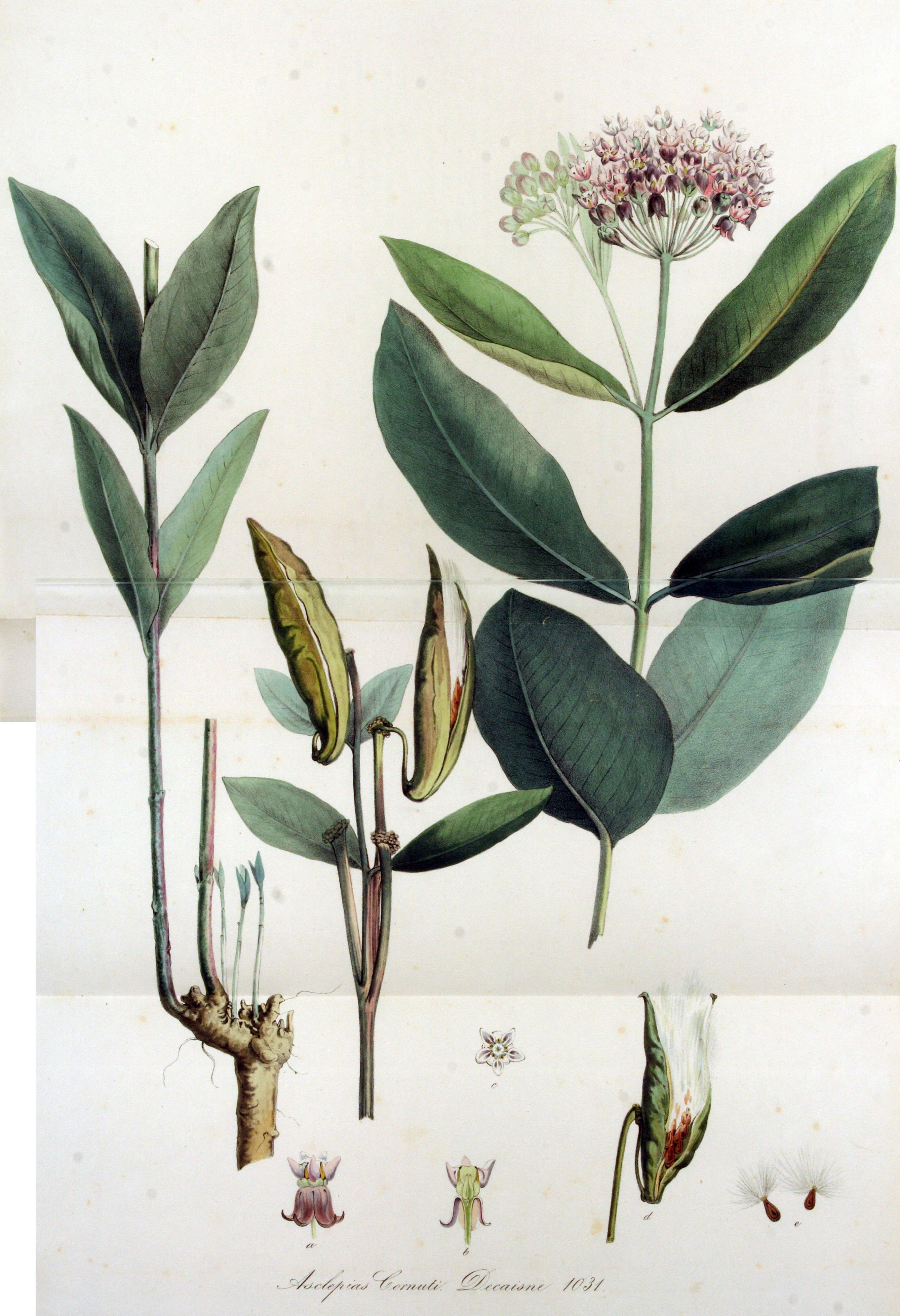 Asclepias syriaca L. (Syn. Asclepias cornuti Decaisne)